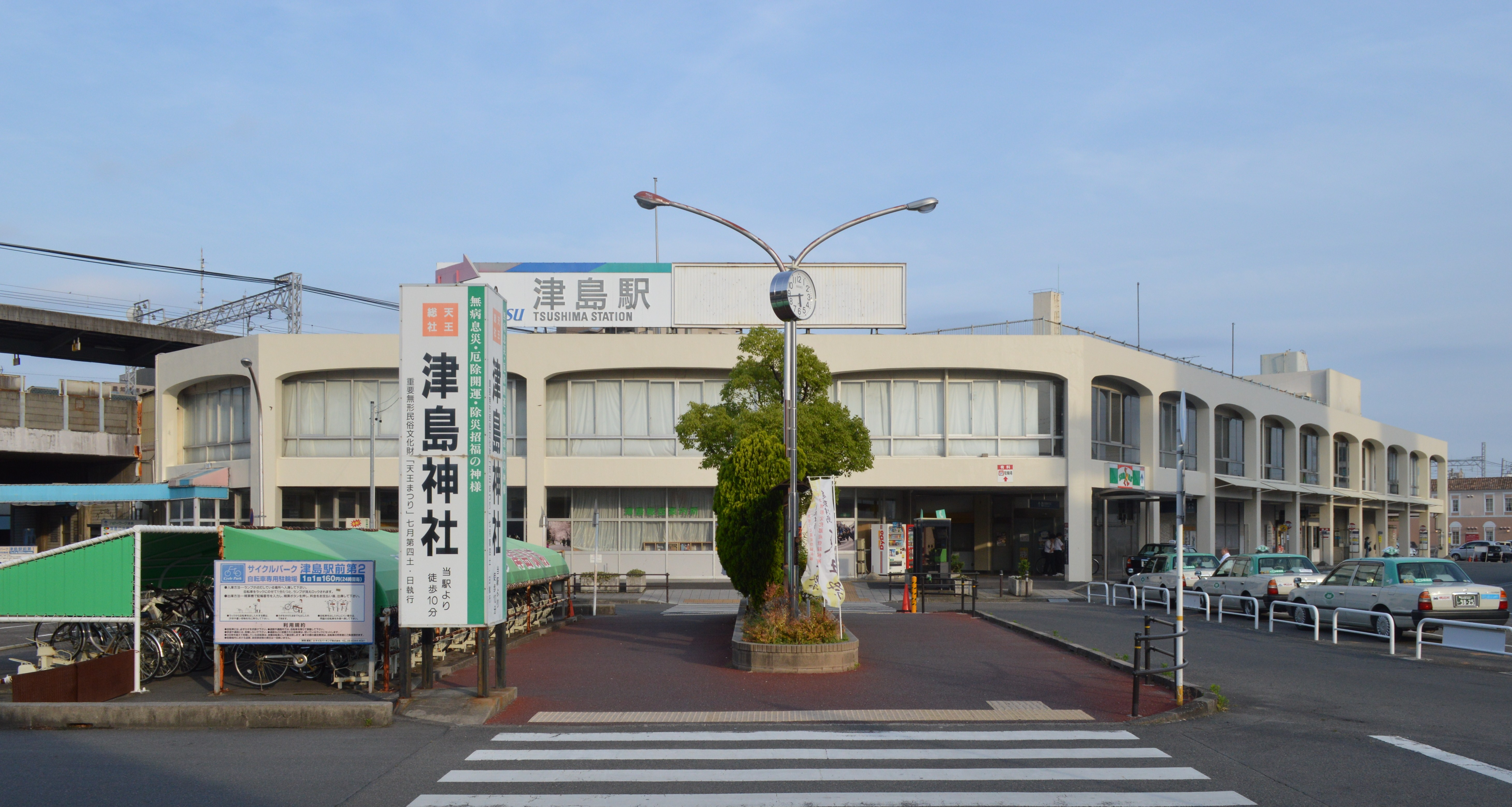 名鉄津島駅